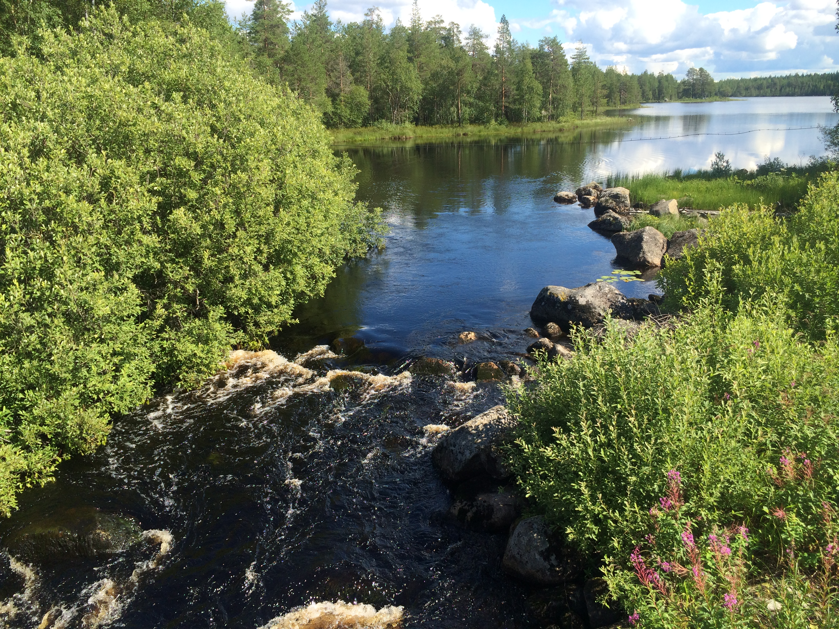 Сулос